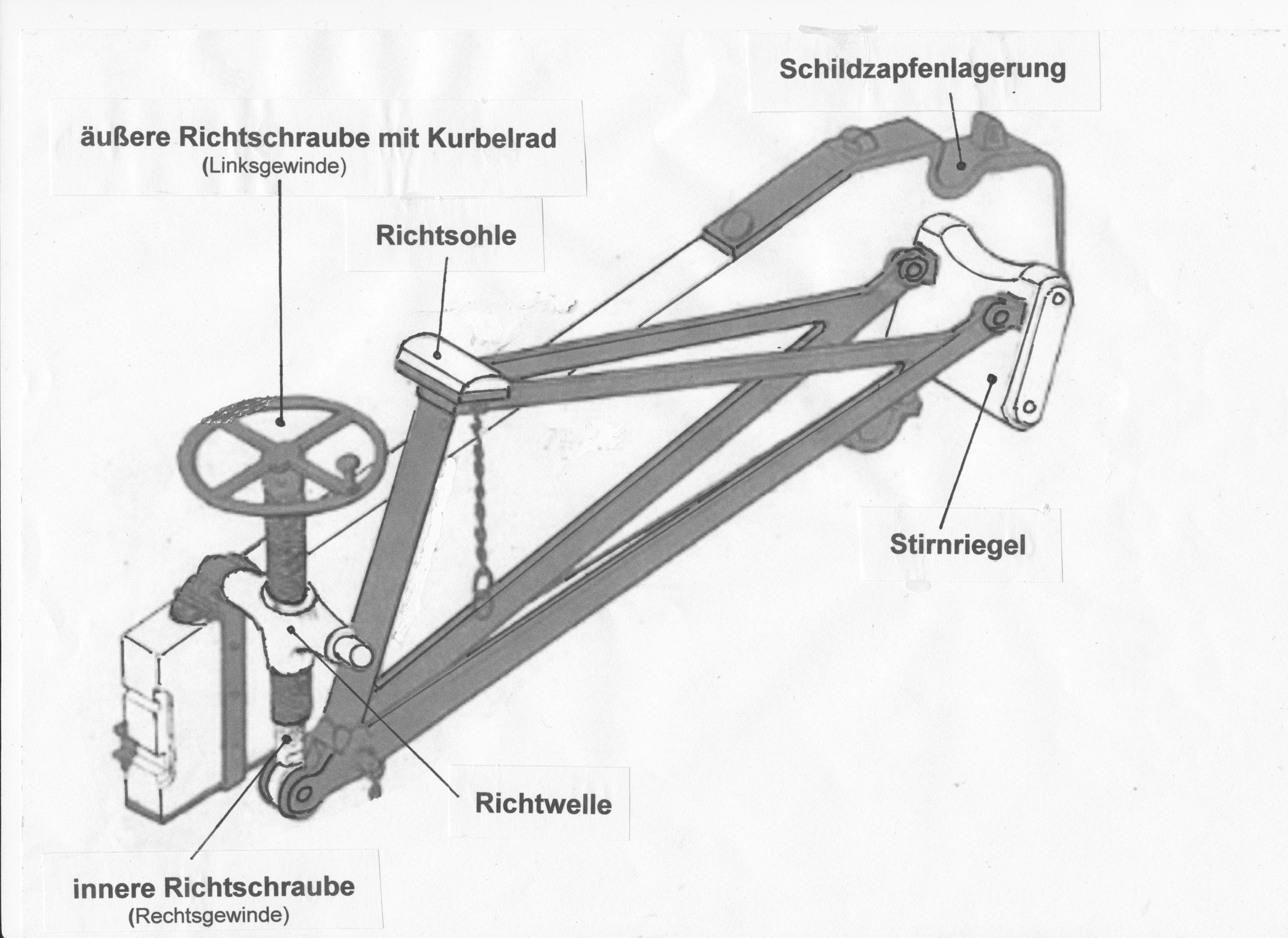 Preußische Richtmaschine C 64 für Feldgeschütze